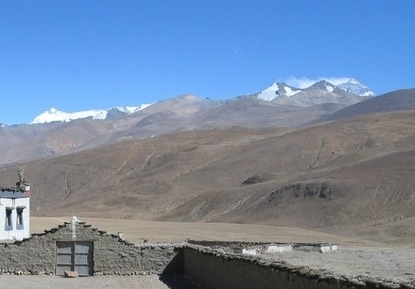 Schulhof in Zombuk mit Everestblick